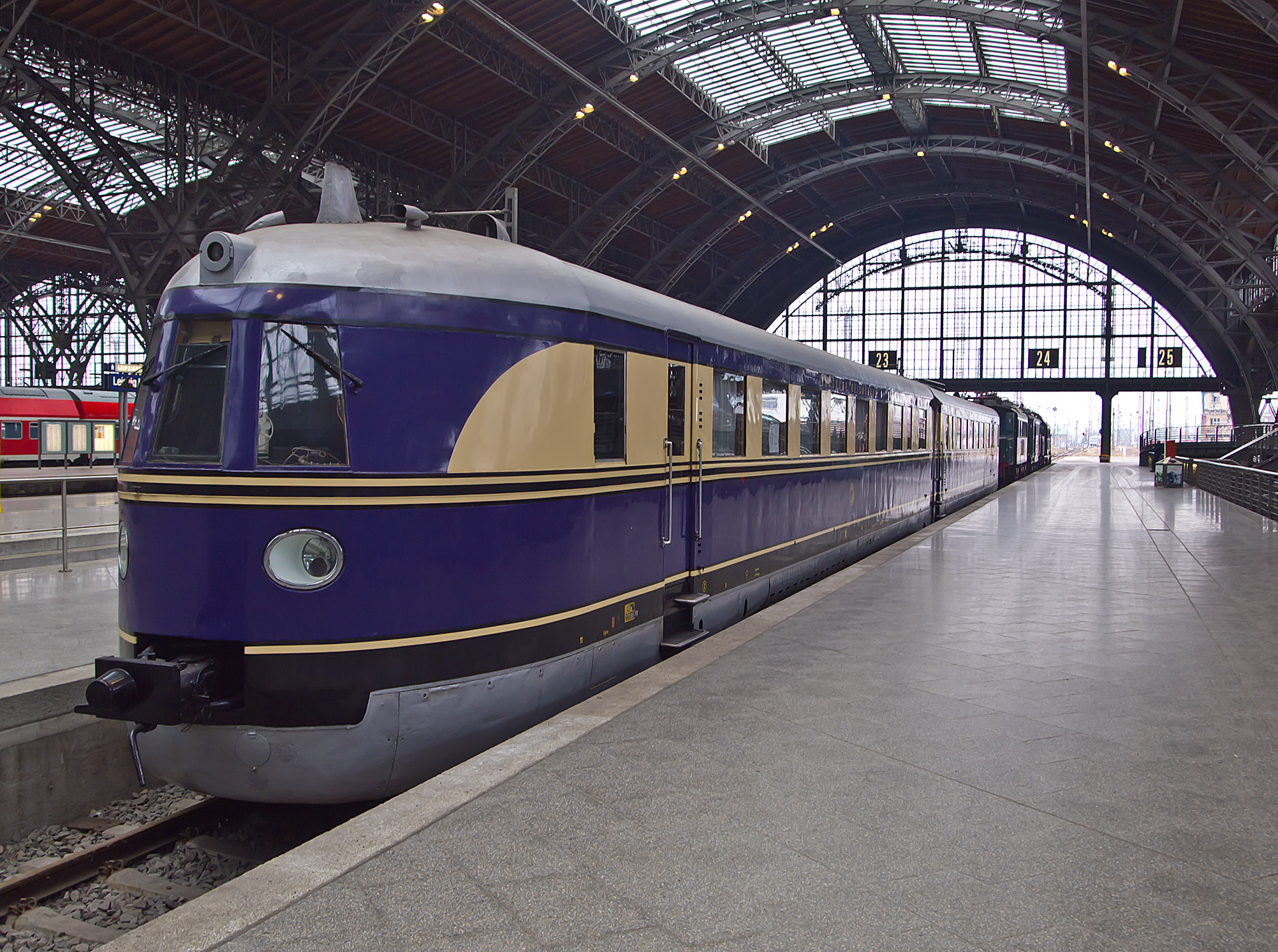 Schnelltriebwagen SVT 137 Bauart Hamburg der Deutschen Reichsbahn von 1935 im Hauptbahnhof Leipzig auf Gleis 24. Der SVT 137 ist der Nachfolger des „Fliegenden Hamburgers“, er hat eine Höchstgeschwindigkeit von 160 km/h, die auch fahrplanmäßig ausgefahren wurde. Im Hintergrund sind 3 Elektroloks: Schnellzuglok E04 (110 km/h, Baujahr: 1932), Universallok E44 (90 km/h, Bj: 1932-55) und Güterzuglok E94 (90 km/h, Bj: 1942). Die Dampflok BR52 steht vor dem Schnelltriebwagen.